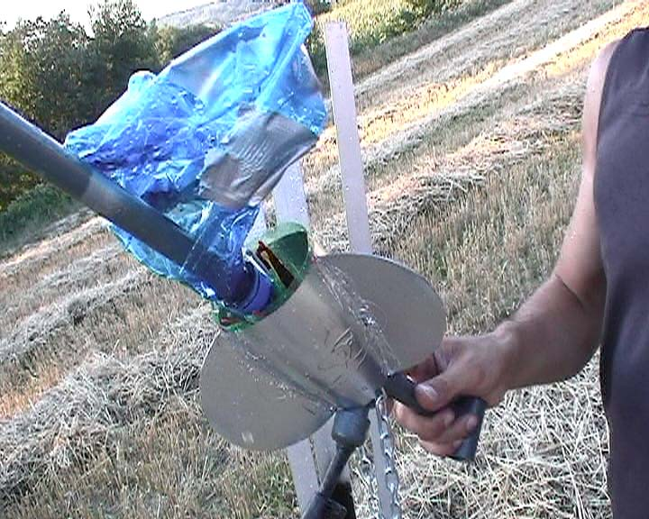 Un Razzo ad Acqua esploso, a Water rocket exploded